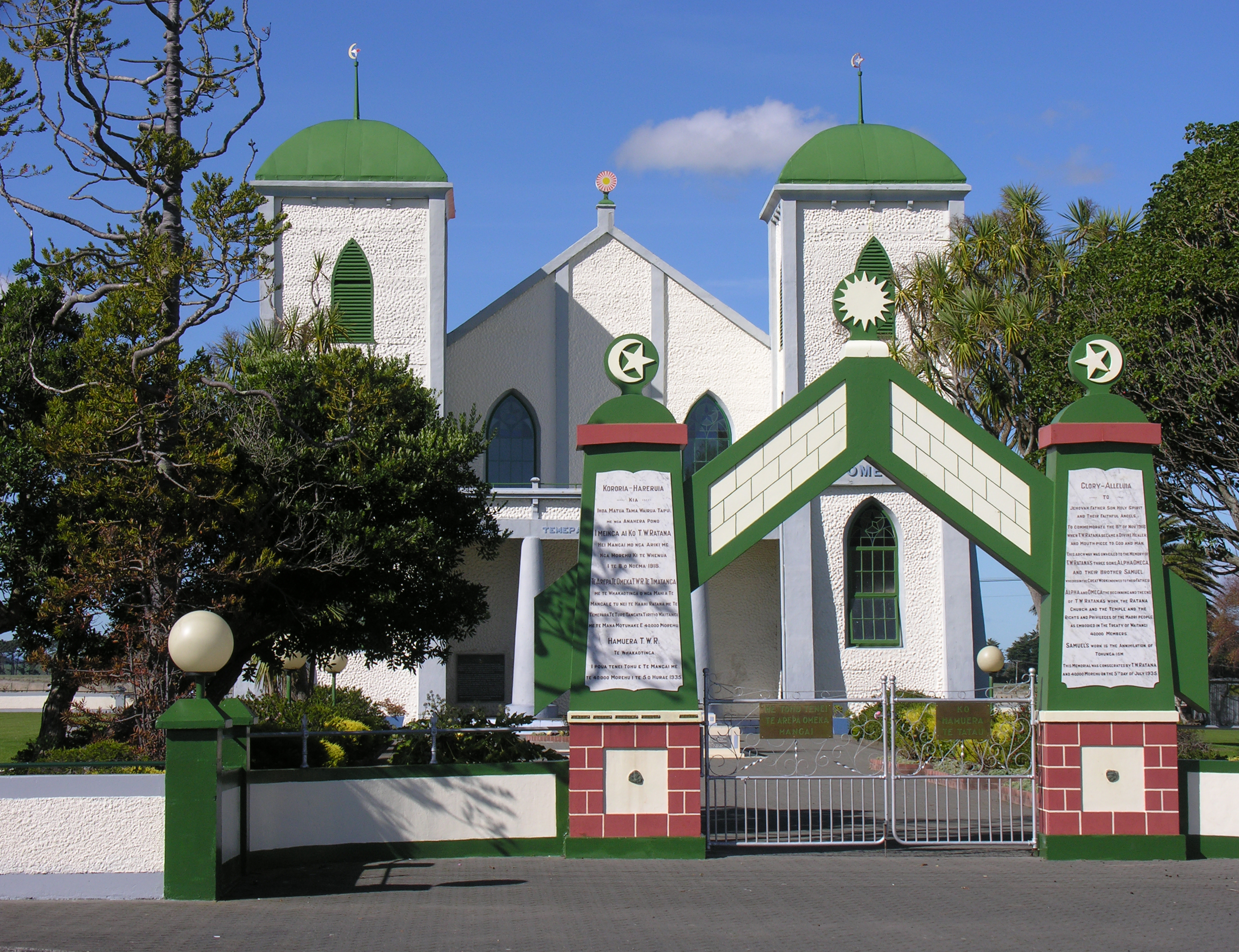 The temple at Ratana Pa, Whanganui.